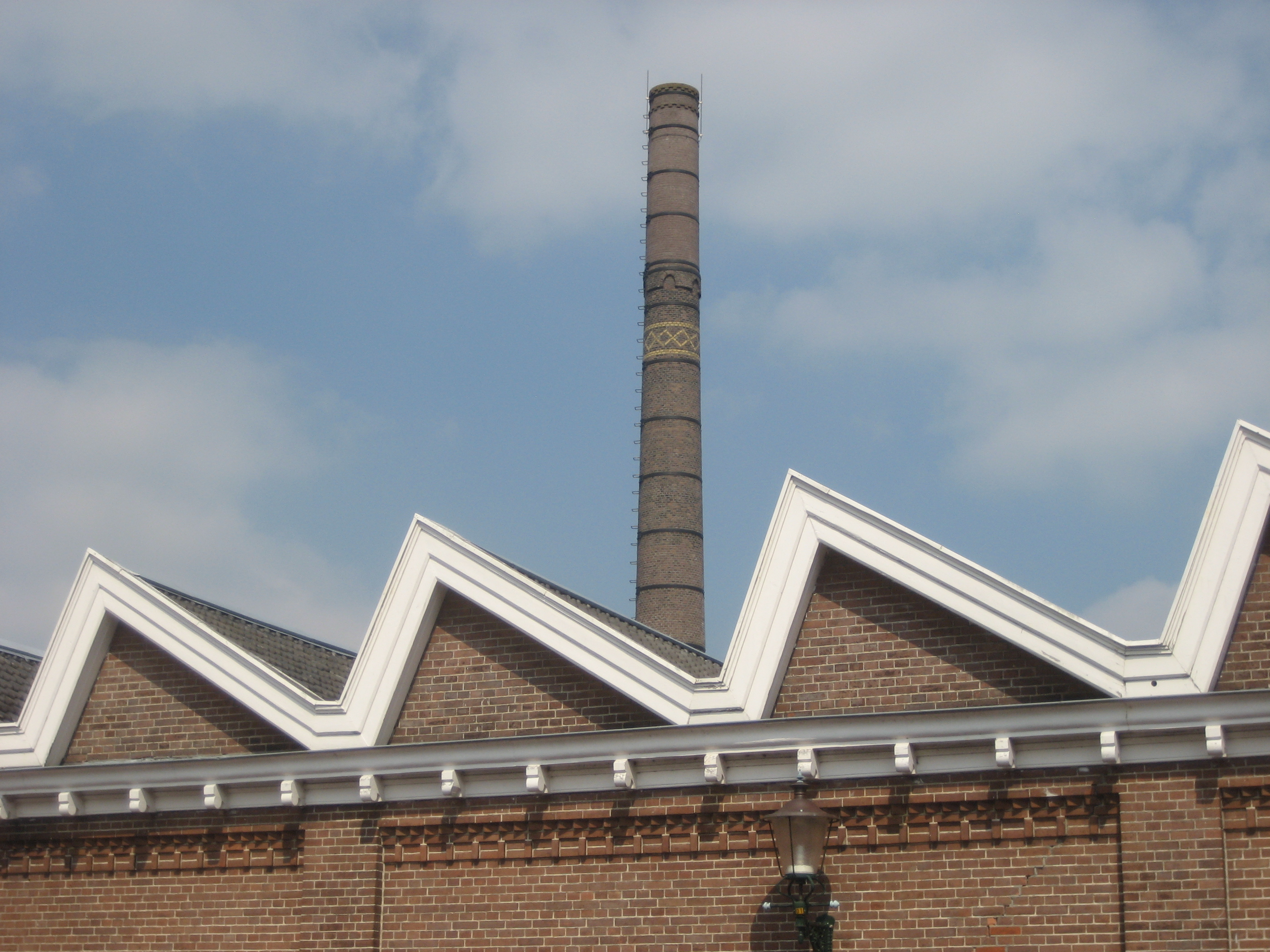 Voormalige fabrieken in Delden (nu Supermarkt Jumbo)